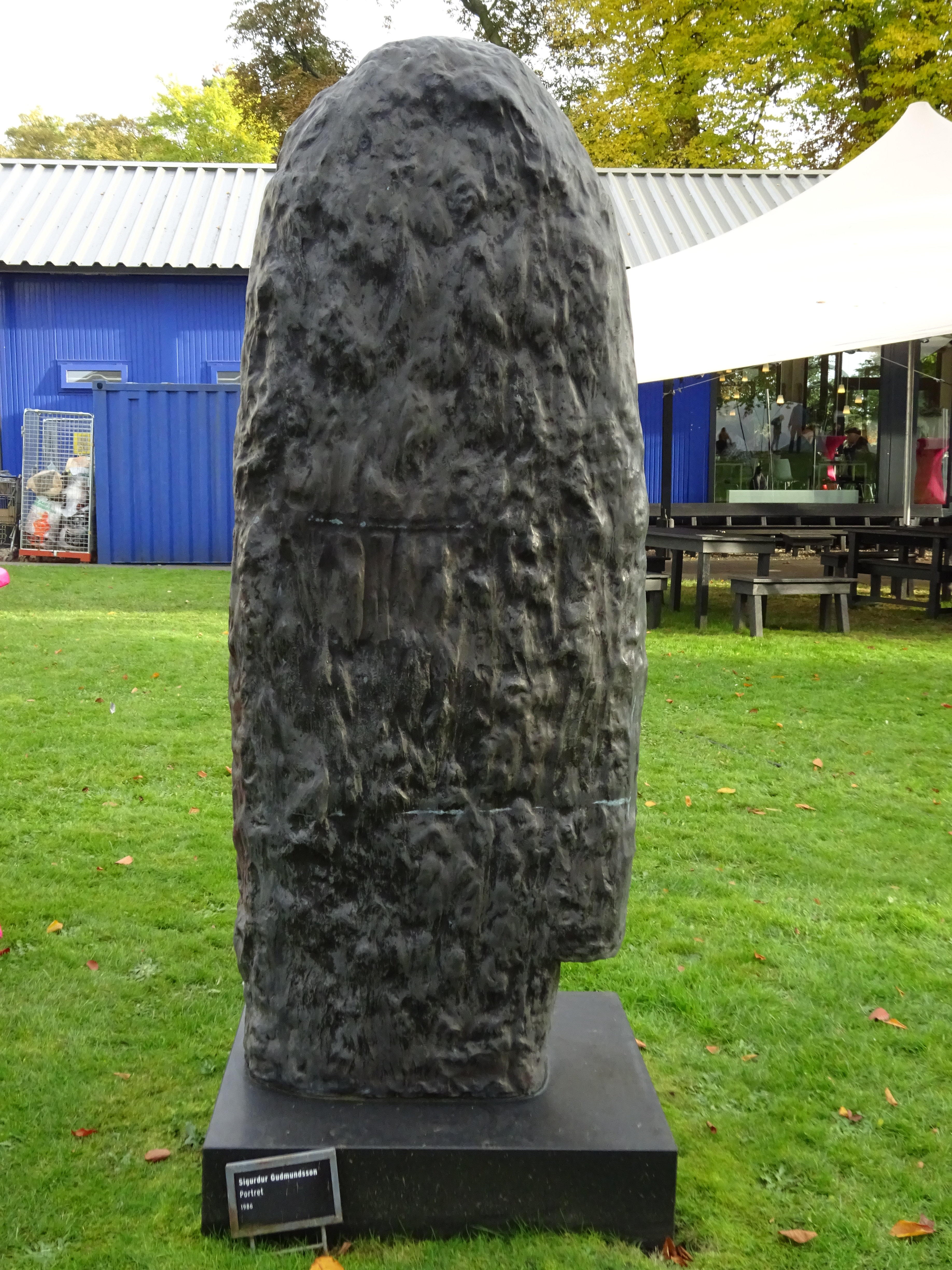 Plastiek van Sigurdur Gudmundsson - Portret, 1986 Museum Arnhem